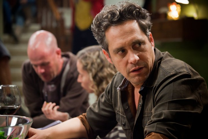 ירון מוטולה על הסט של "עניין של זמן: גרסה מחודשת"